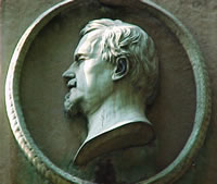 Denkmal Carl Bernhard in Den Haag, Lange Voorhout (Detail)